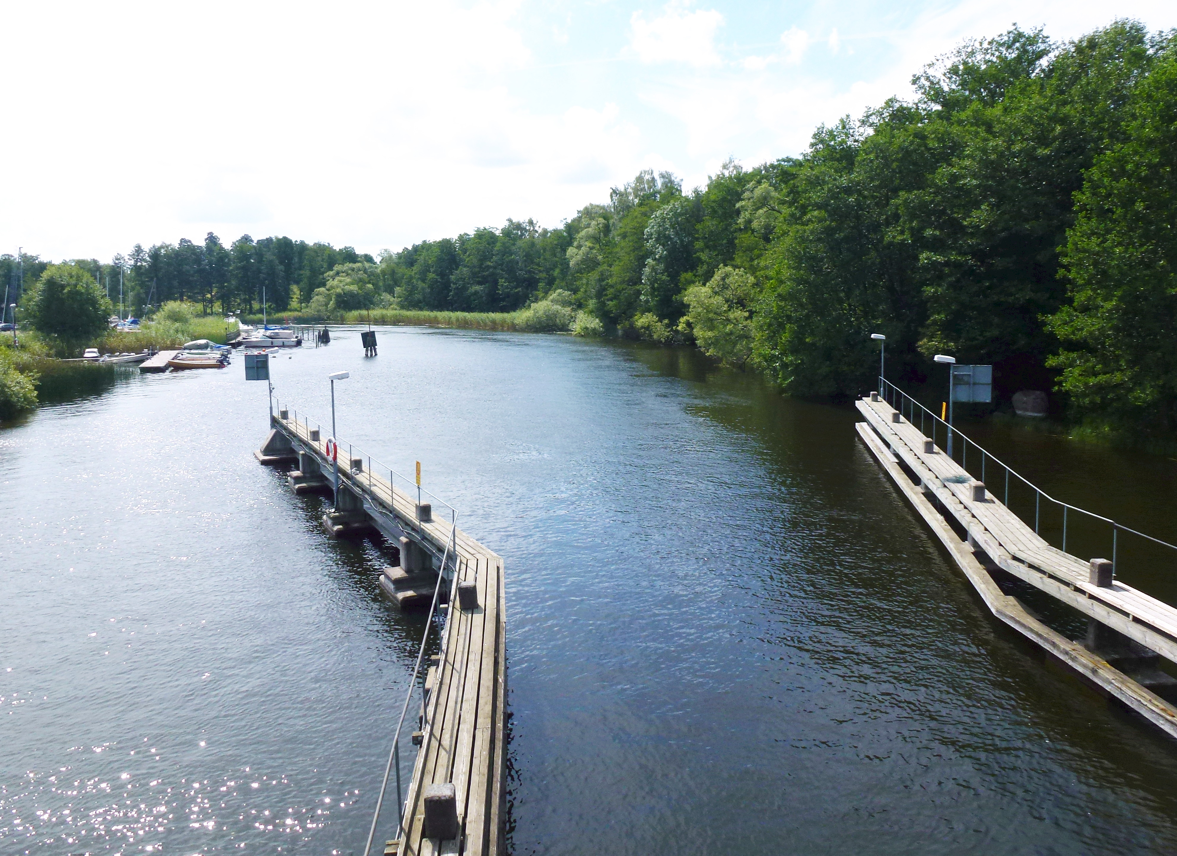 Stäksundet med Stäketsholmen till höger